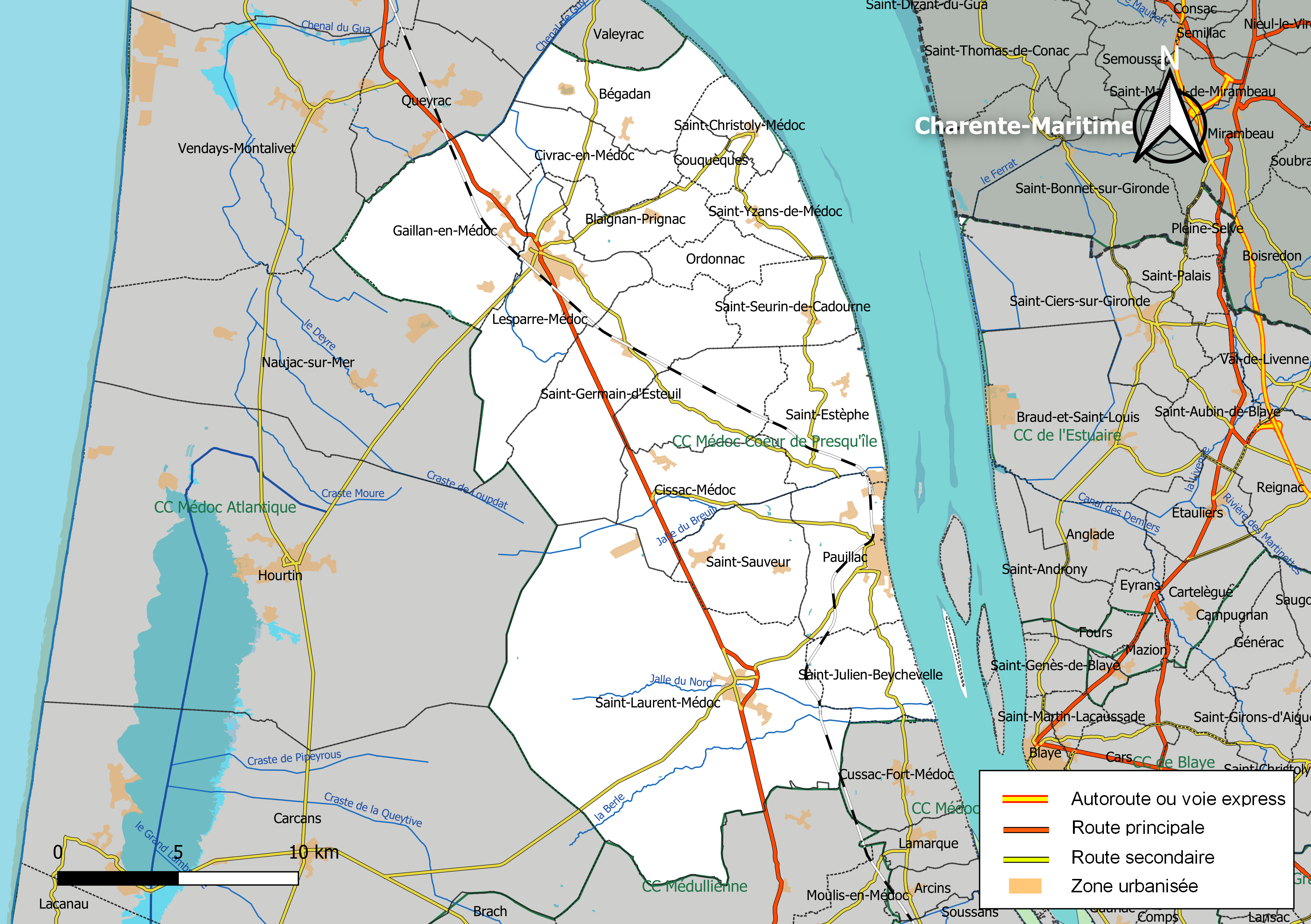 Carte géographique de la Communauté de communes Médoc Cœur de Presqu'île, département de la Gironde, France. Composition au 1er janvier 2019.